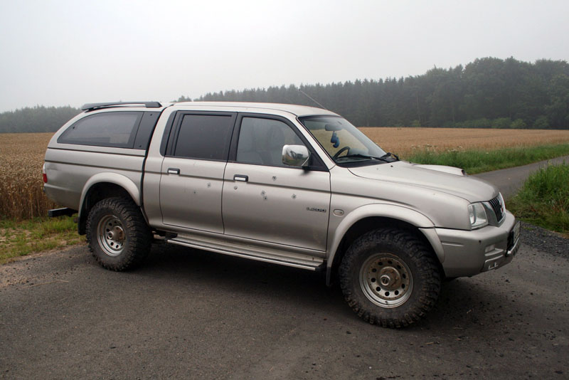 Geländewagen ohne Car Wrapping